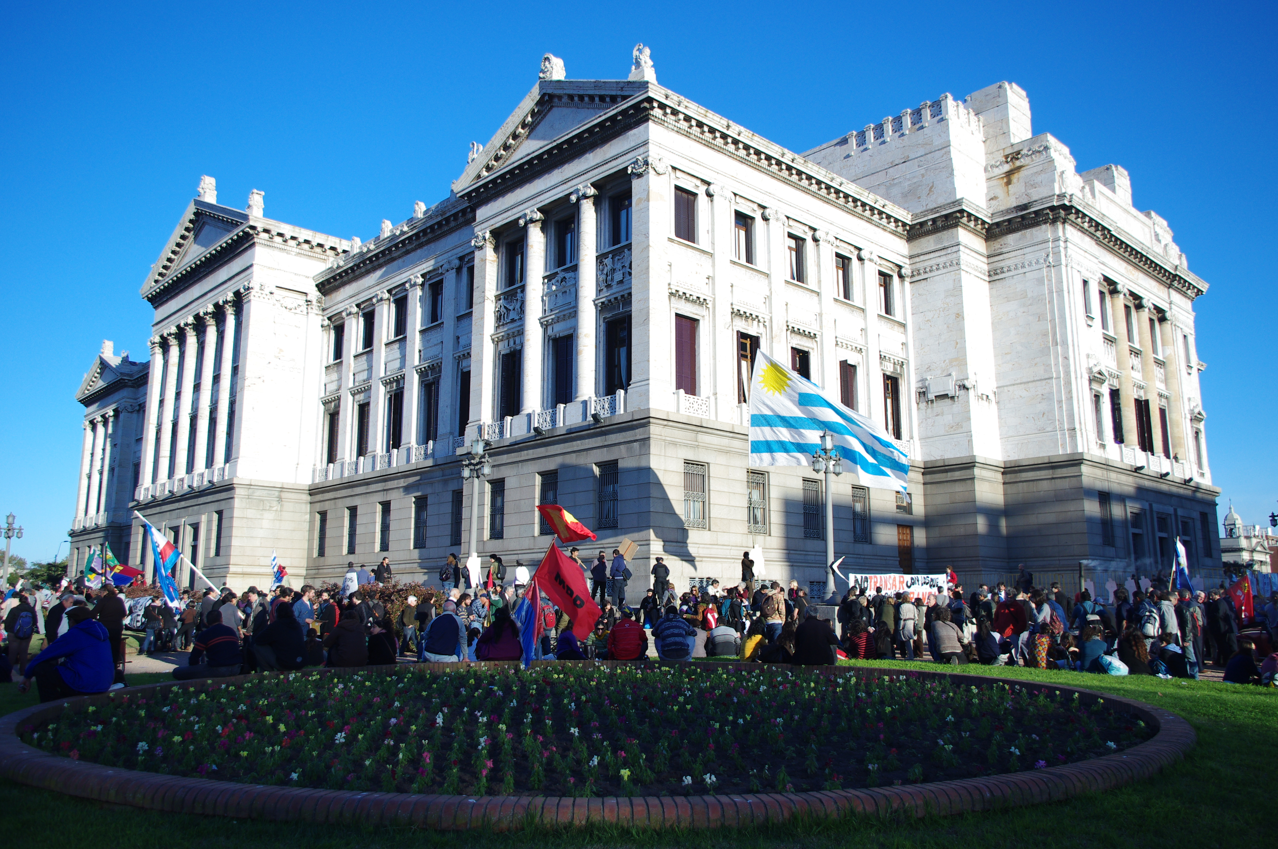 En Uruguay, manifestantes a favor del Proyecto interpretativo de la Ley de Caducidad fuera del Palacio Legislativo en el marco de la votación en la Cámara de Diputados.